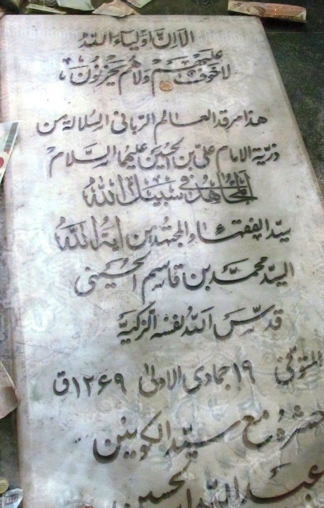 مزار آیت الله سید محمد مجتهد سردانی